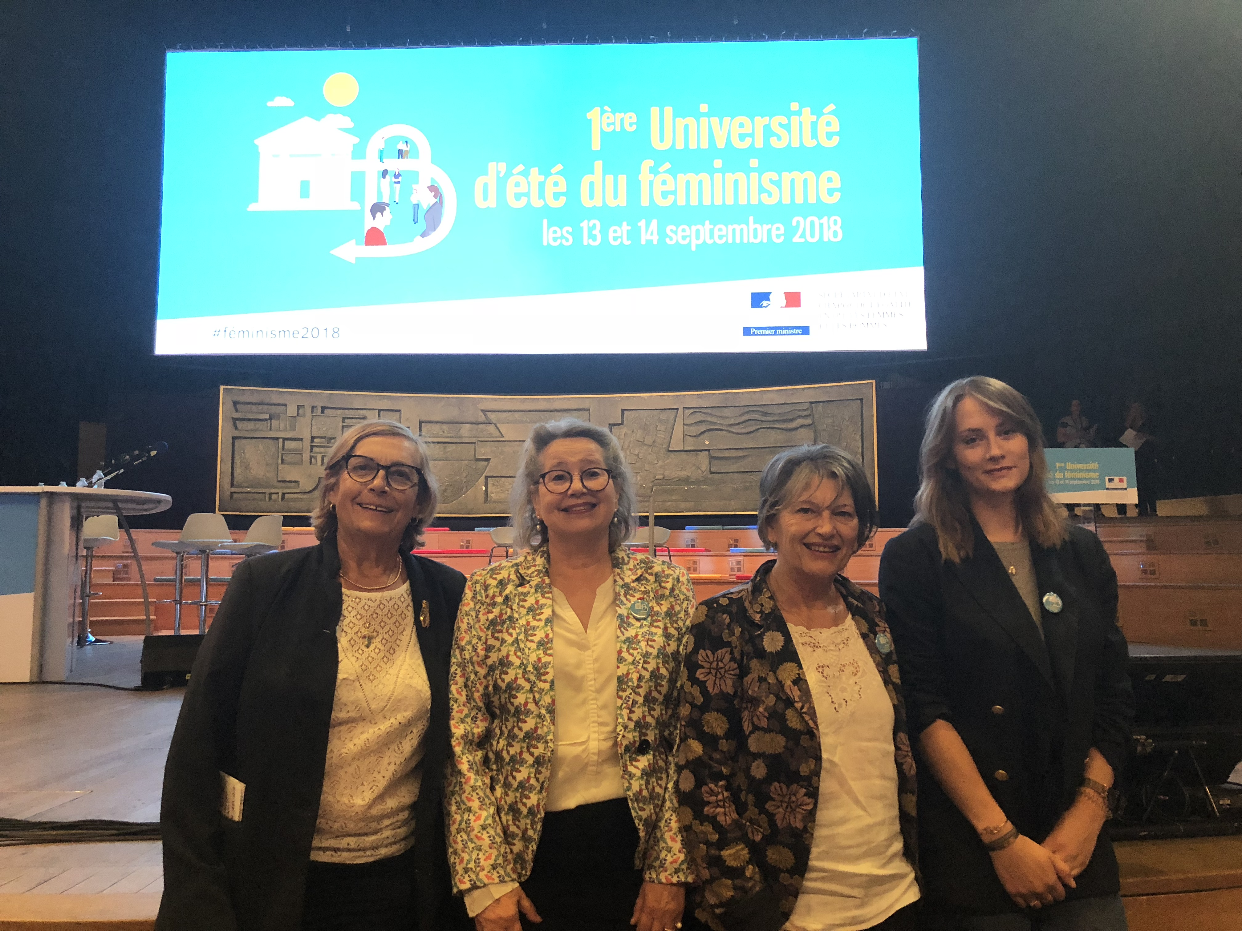 Photo prise à l'Université d'été du Féminisme 2018 organisée par le secrétariat d'État à l'égalité entre hommes et femmes à Paris les 12 et 13 septembre 2018